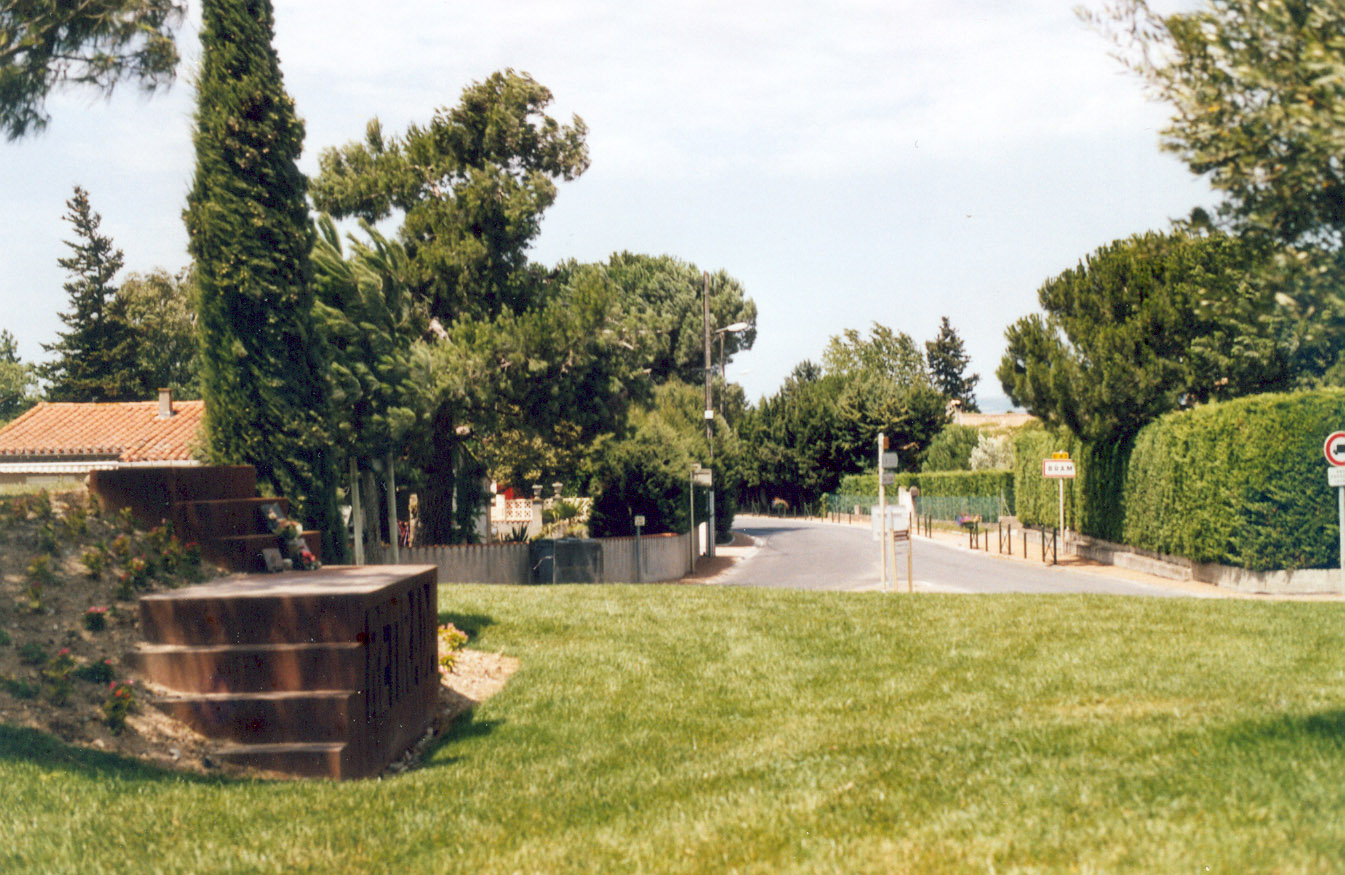 Bram